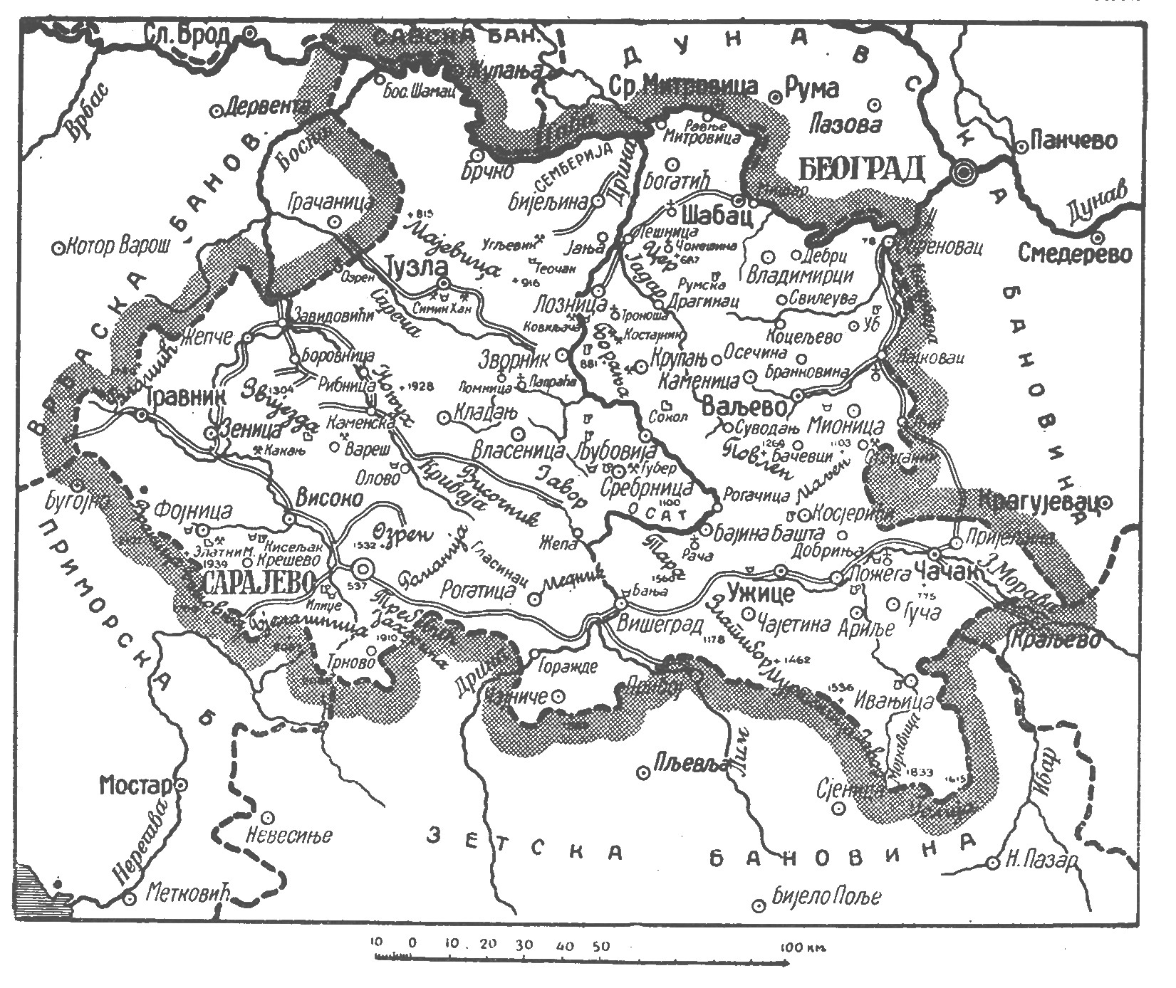 Карта Дринске бановине.